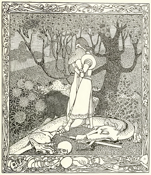 Drachentöter, Illustration, um 1902